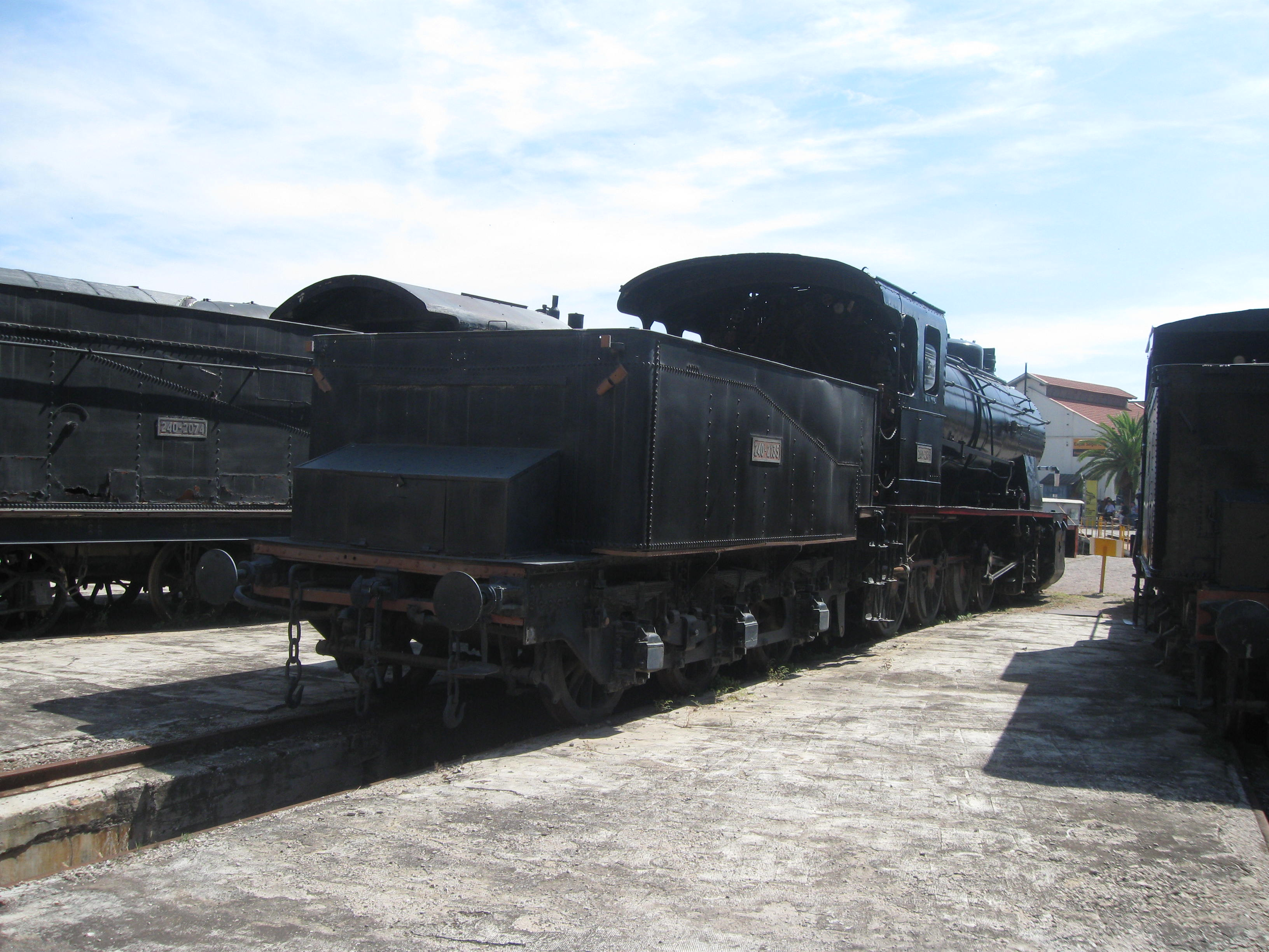 Locomotora del tipo mastodonte de MZA con el número 1155, fue renumerada en RENFE con el número 240-2135 Unknown